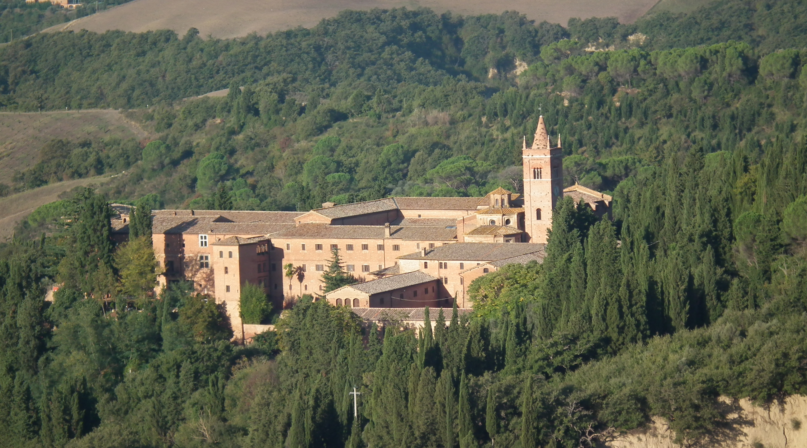 Vue générale sur l'abbaye de Monte Oliveto Maggiore